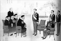 Verhandlung des Luda-Pachtvertrages 1898